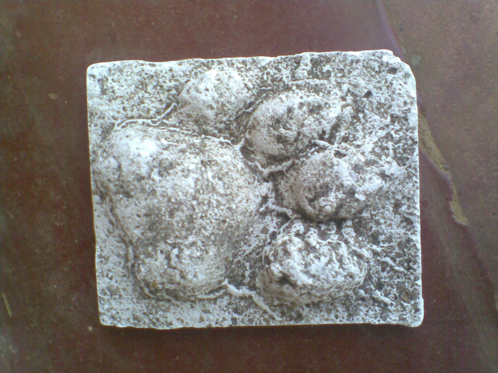 കടുവയുടെ കാല്പാദം മോൾഡ് ചിത്രം